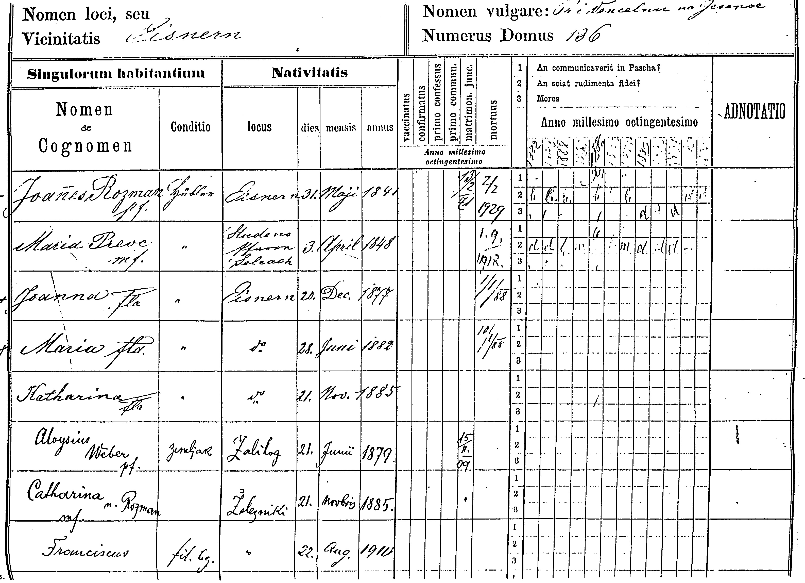 Status animarum (knjiga župljanov oz. knjiga faranov) župnije Železniki, vložek za obdobje 1882-1892. Nekateri pojmi: vaccinatus - cepljen confirmatus - birman primo confessus - prvo obhajilo matrimon.junc. - poročen mortuus - umrl an communicaverit in Pascha? - ali gre na veliko noč k spovedi? an sciat rudimentis fidei? - ali dobro pozna verske osnove? mores - običaji